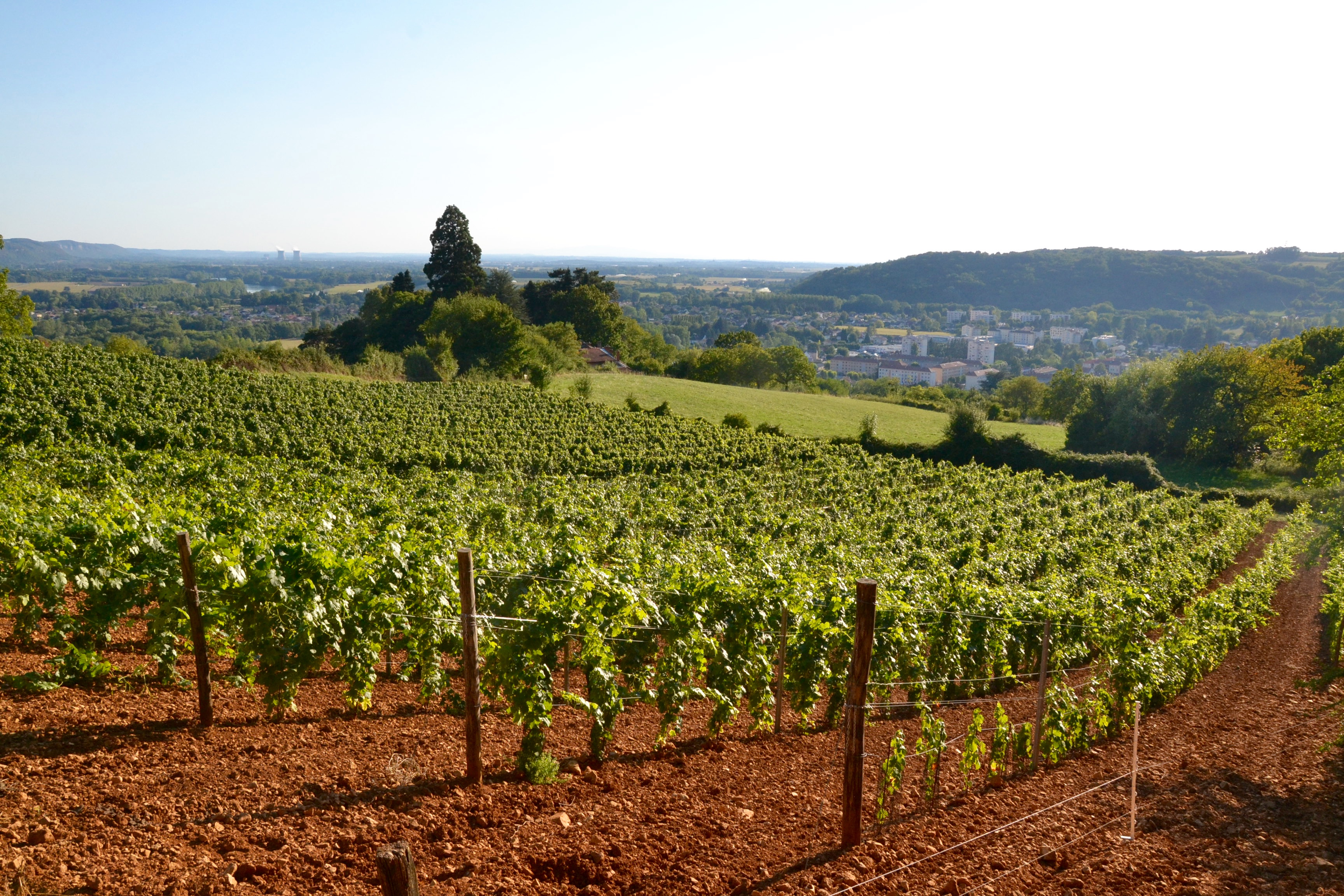 Vignes au-dessus de Lagnieu (Ain, France).